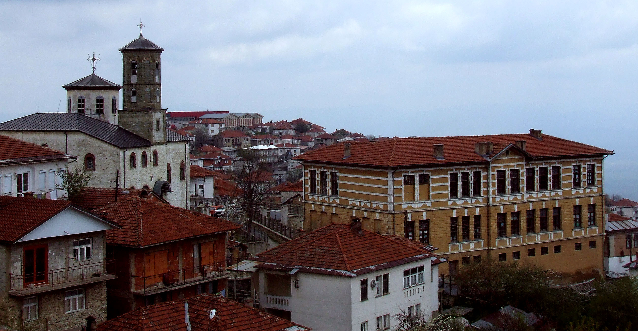 Kruševo, panorama